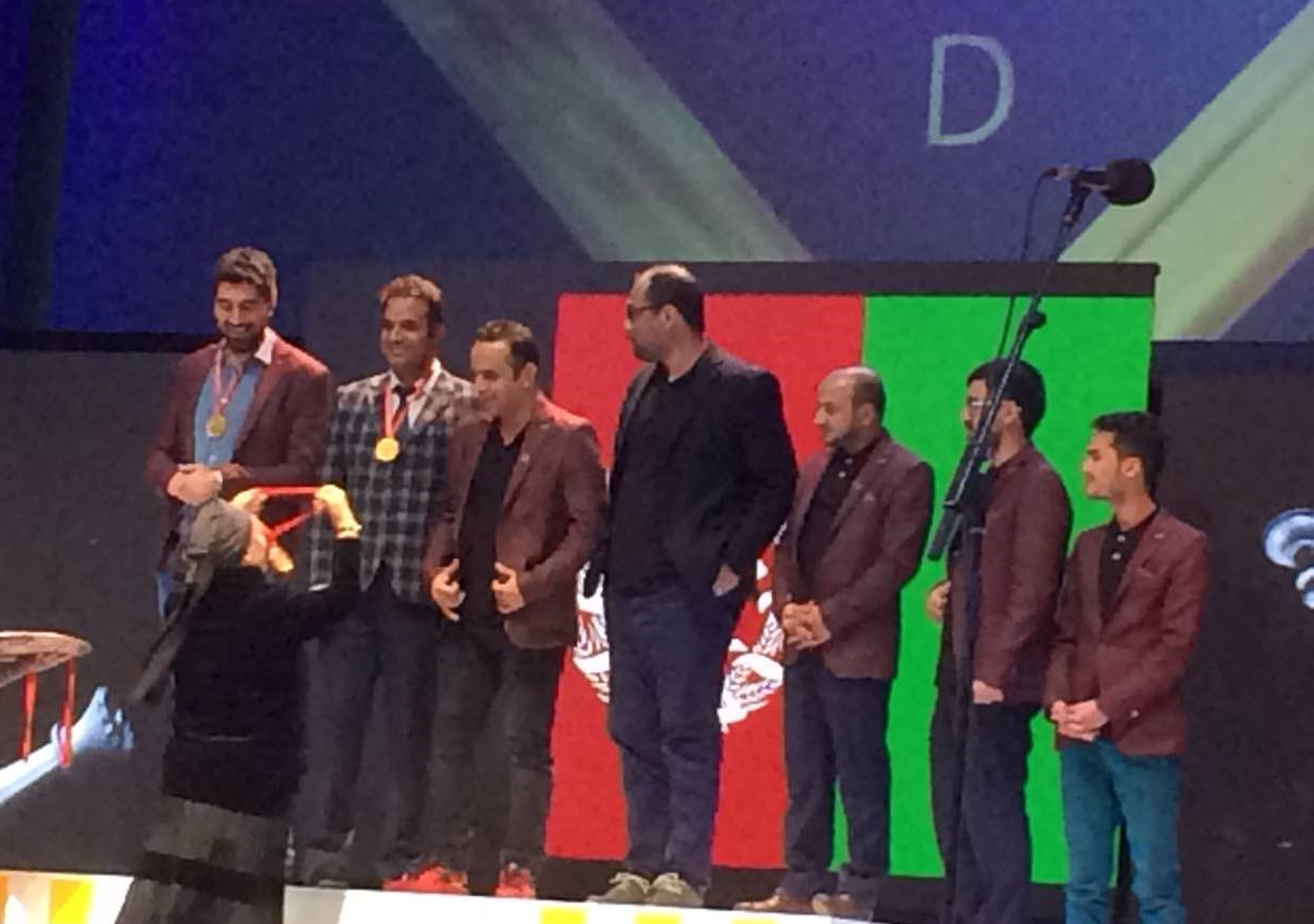 این عکس متعلق به سایت آچمز میباشد